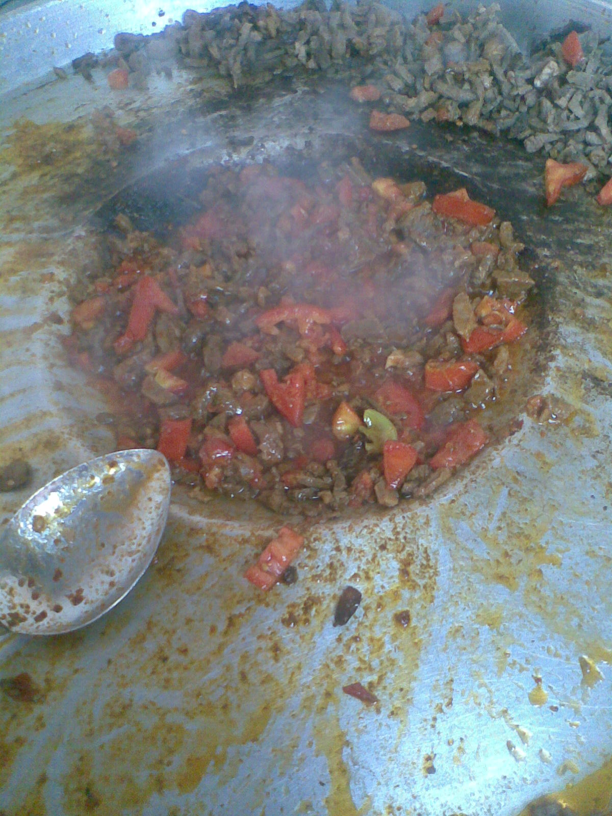 Тантуни - национальное турецкое блюдо из мяса